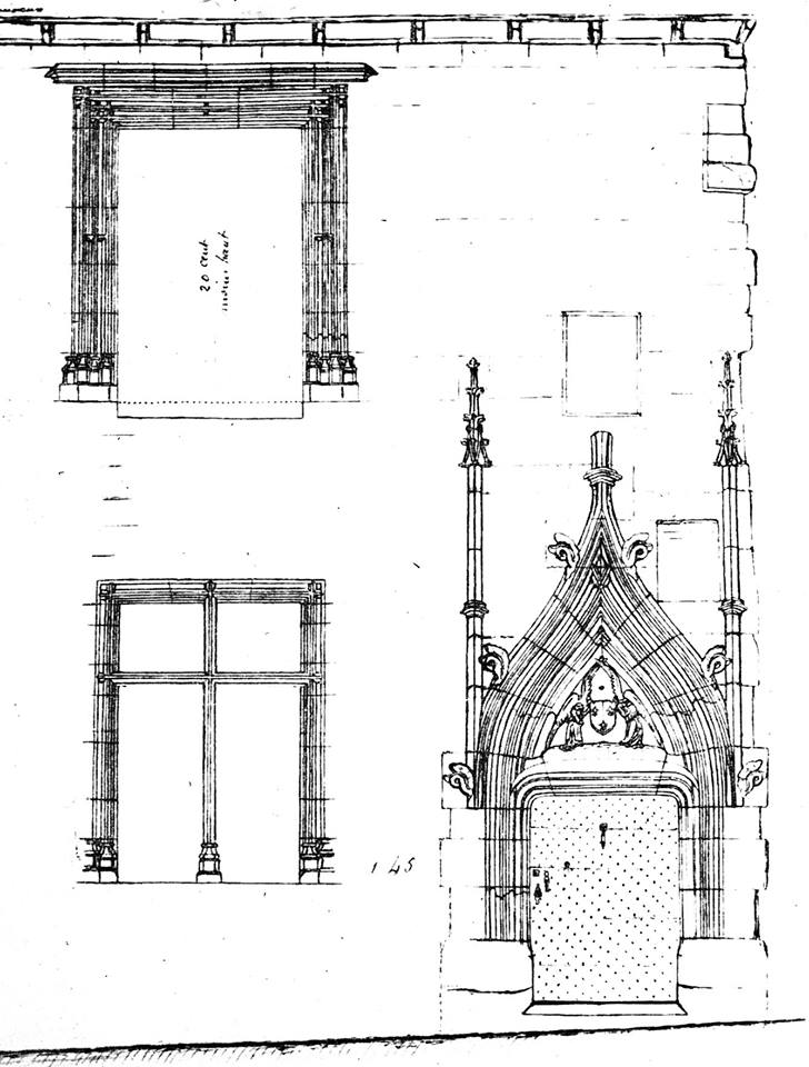 Lectoure, Gers, France. Porte et fenêtres de l’ancienne sénéchaussée (fin XVe s.), dessin d’Eugène Camoreyt (1841-1905).